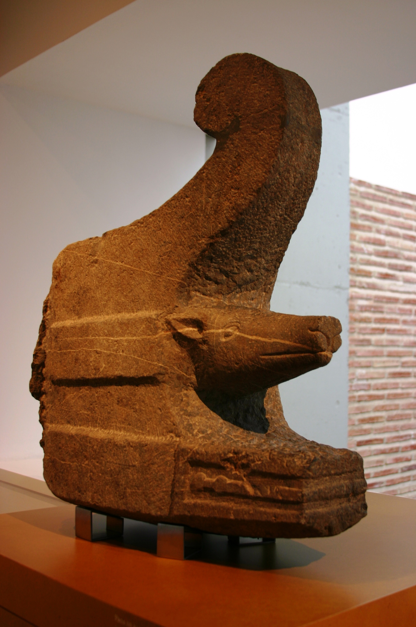 Aríete em pedra